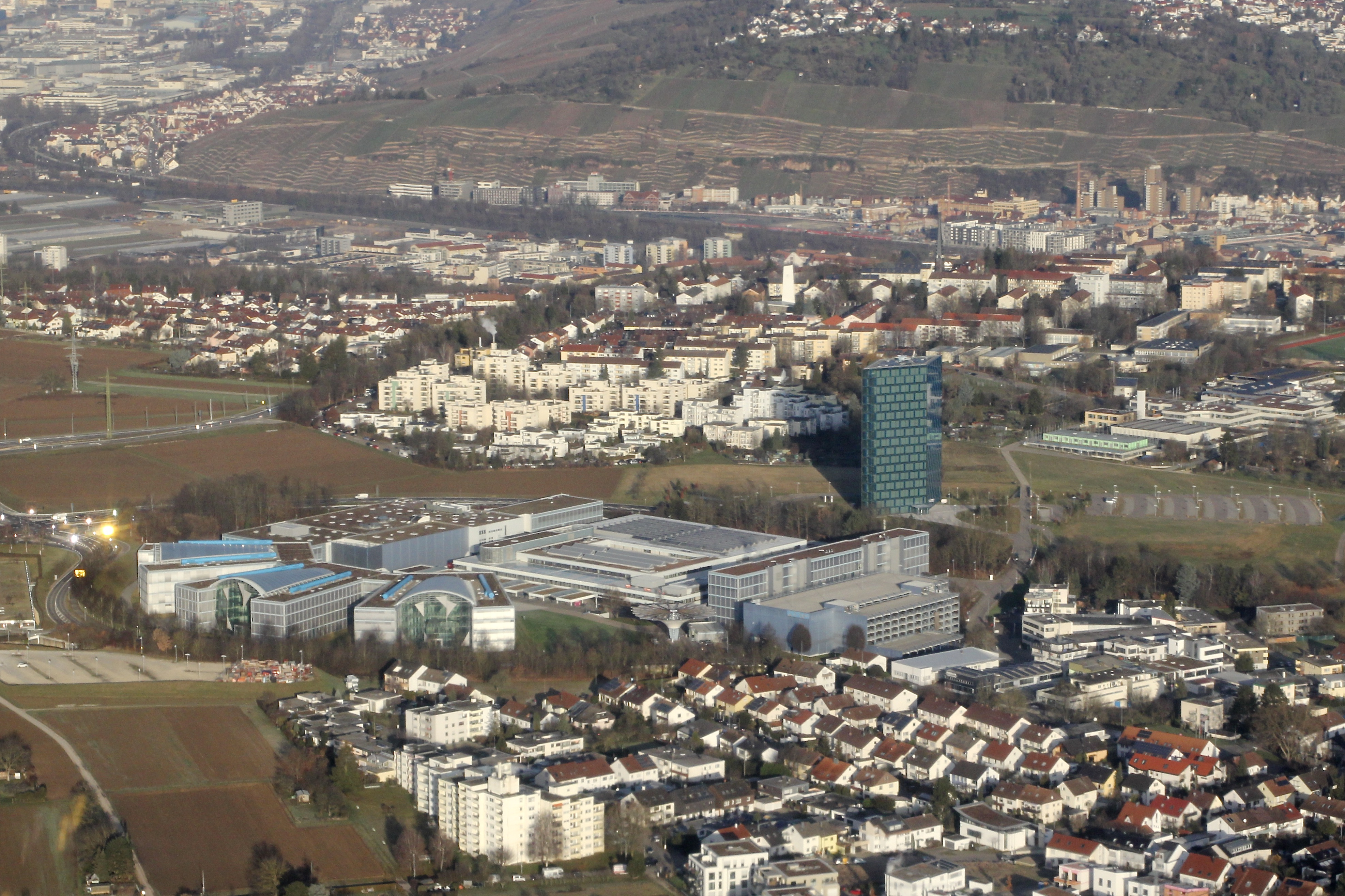 Zentrale der Firma Festo in Esslingen, Baden-Württemberg, aus einem Flugzeug im Anflug auf den nahen Flughafen Stuttgart